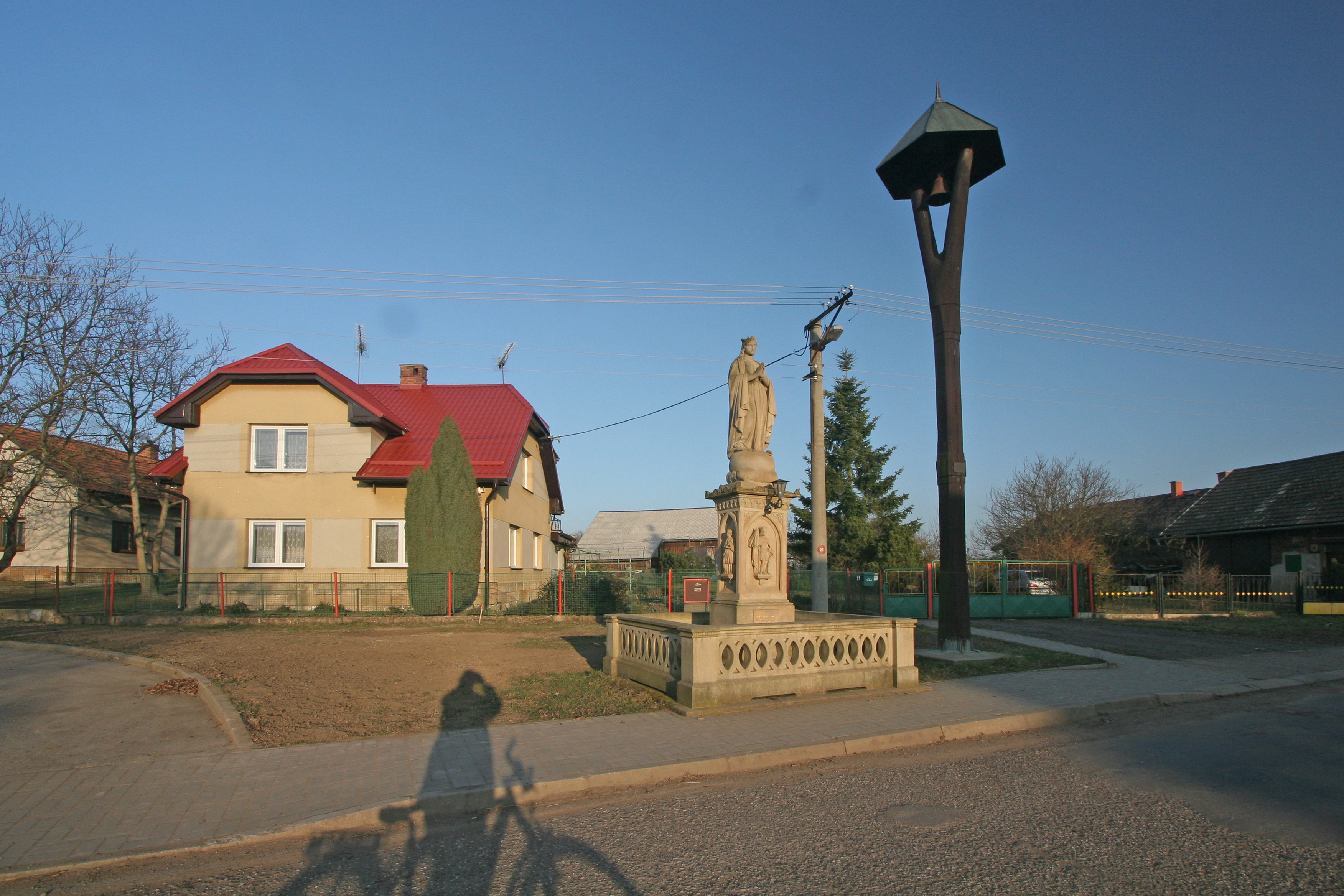 Vrbice socha Panny Marie se zvoničkou